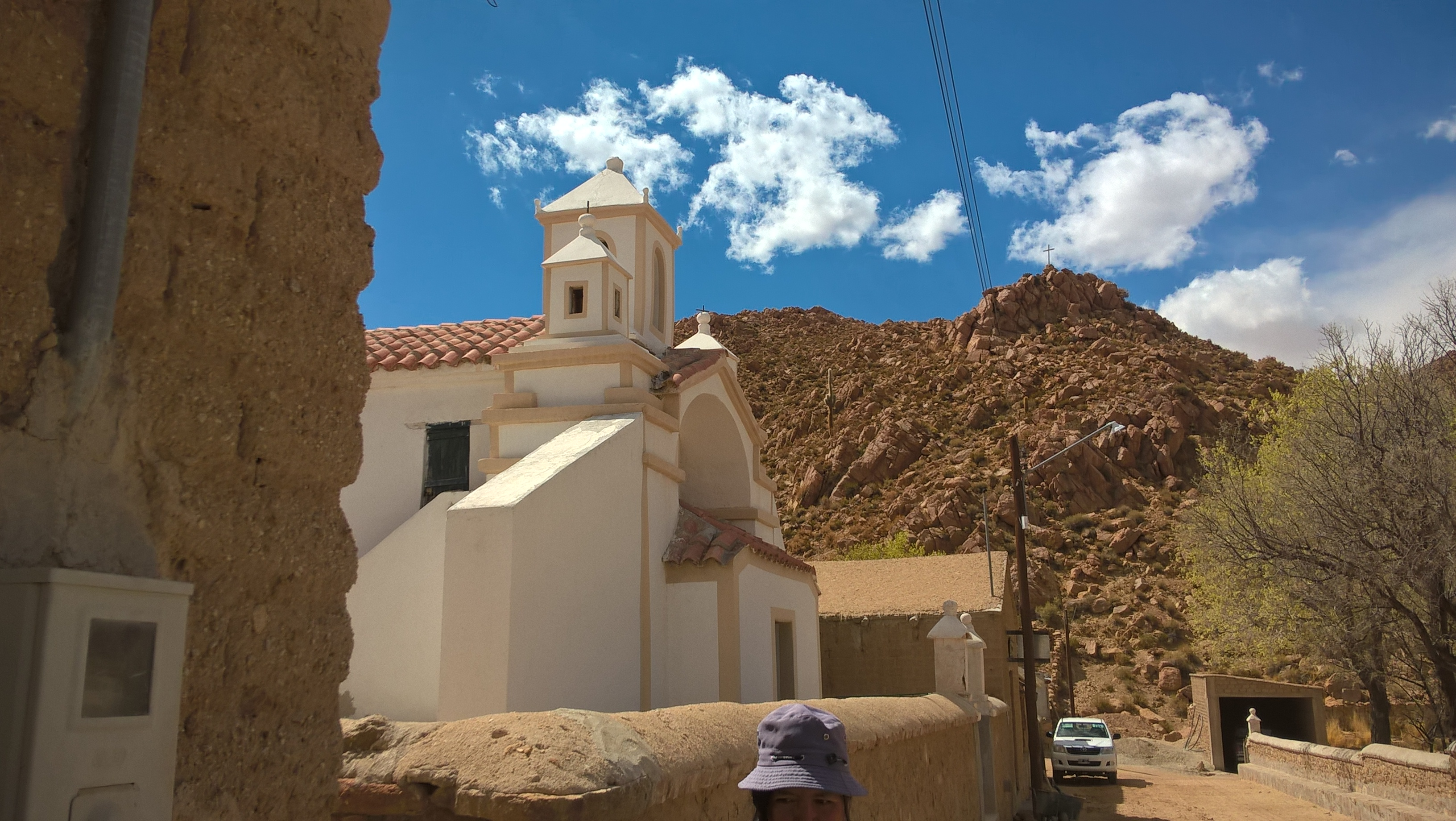 Iglesia San Francisco de Asís, Alfarcito, Jujuy